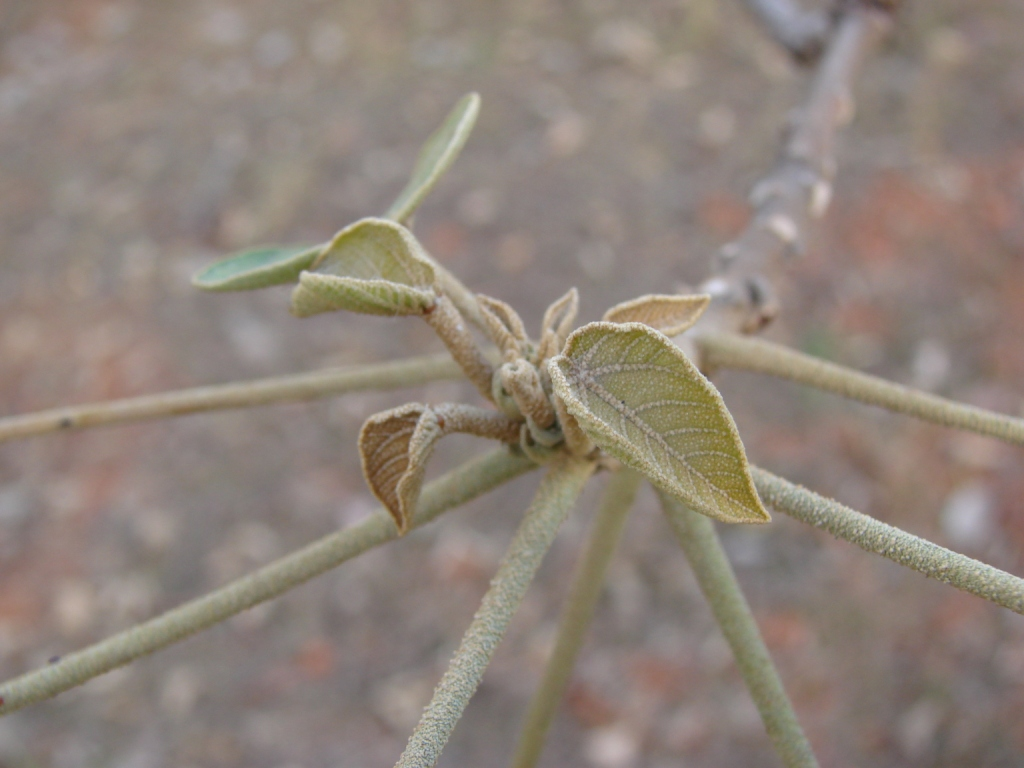 Croton urucurana EUPHORBIACEAE - Parque Olhos D'Água - Brasília - Distrito Federal - Brasil.